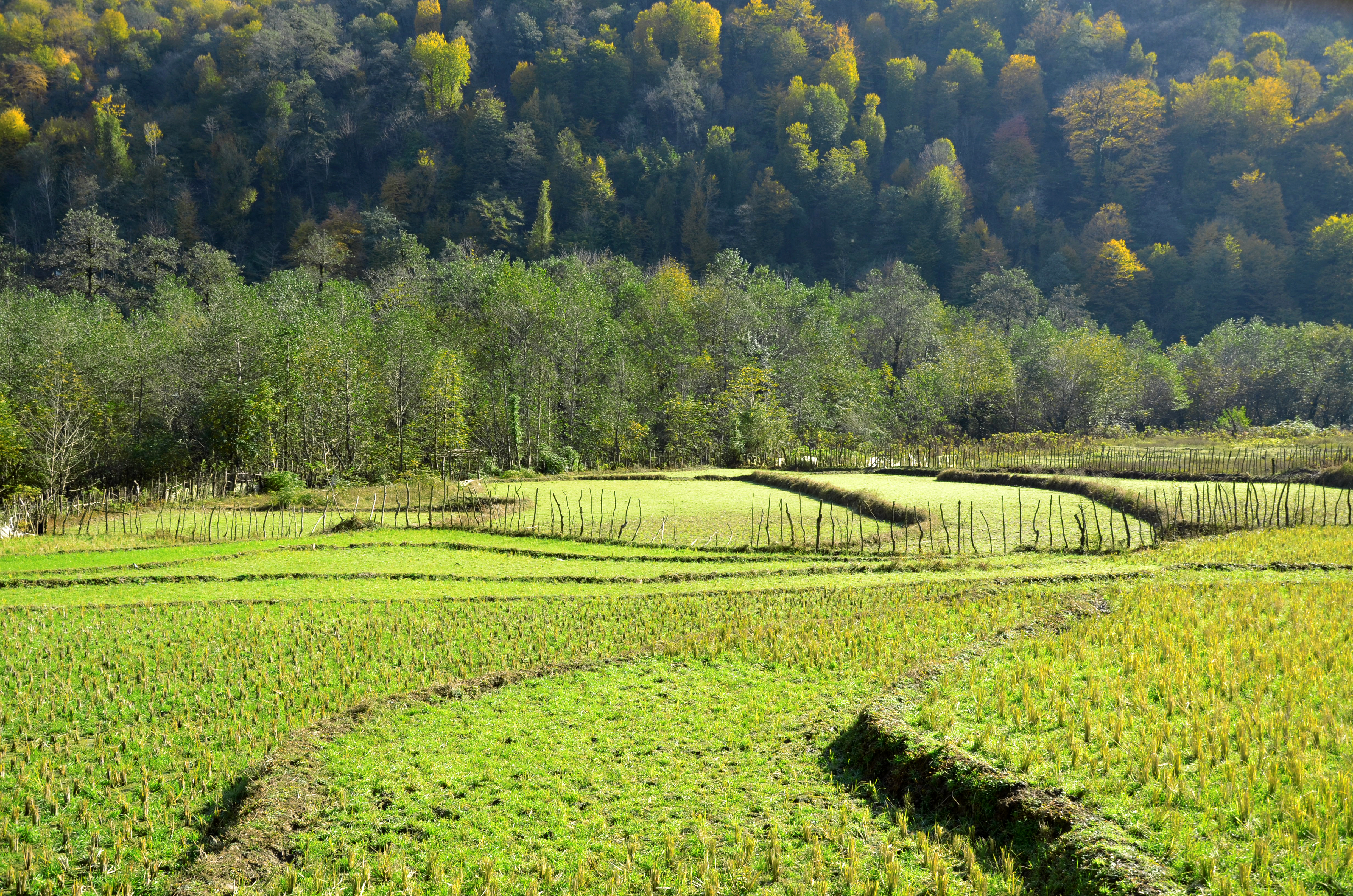 Gilan - Siyahkal